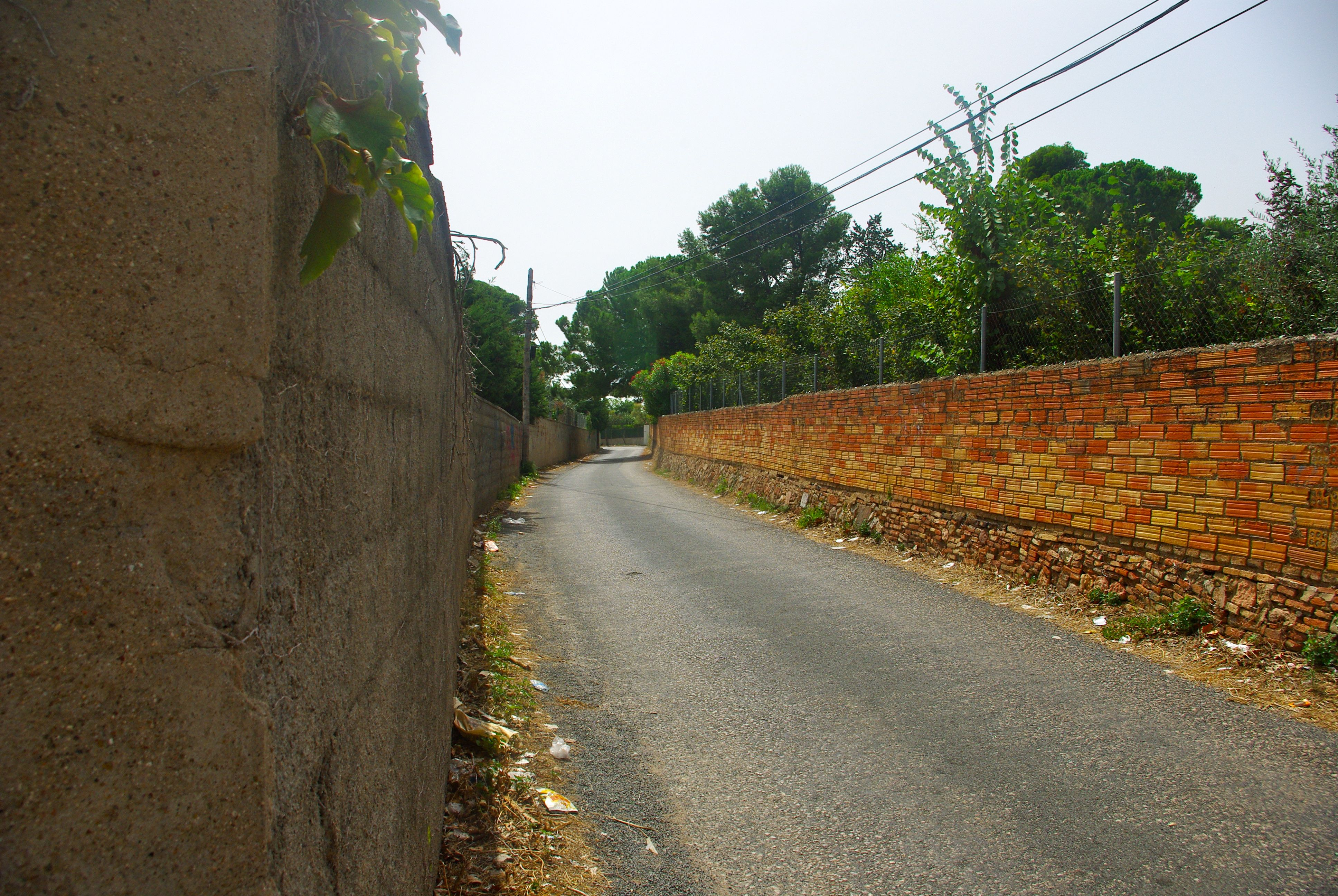 Camí de la Pedra Estela en els seus inicis. Reus